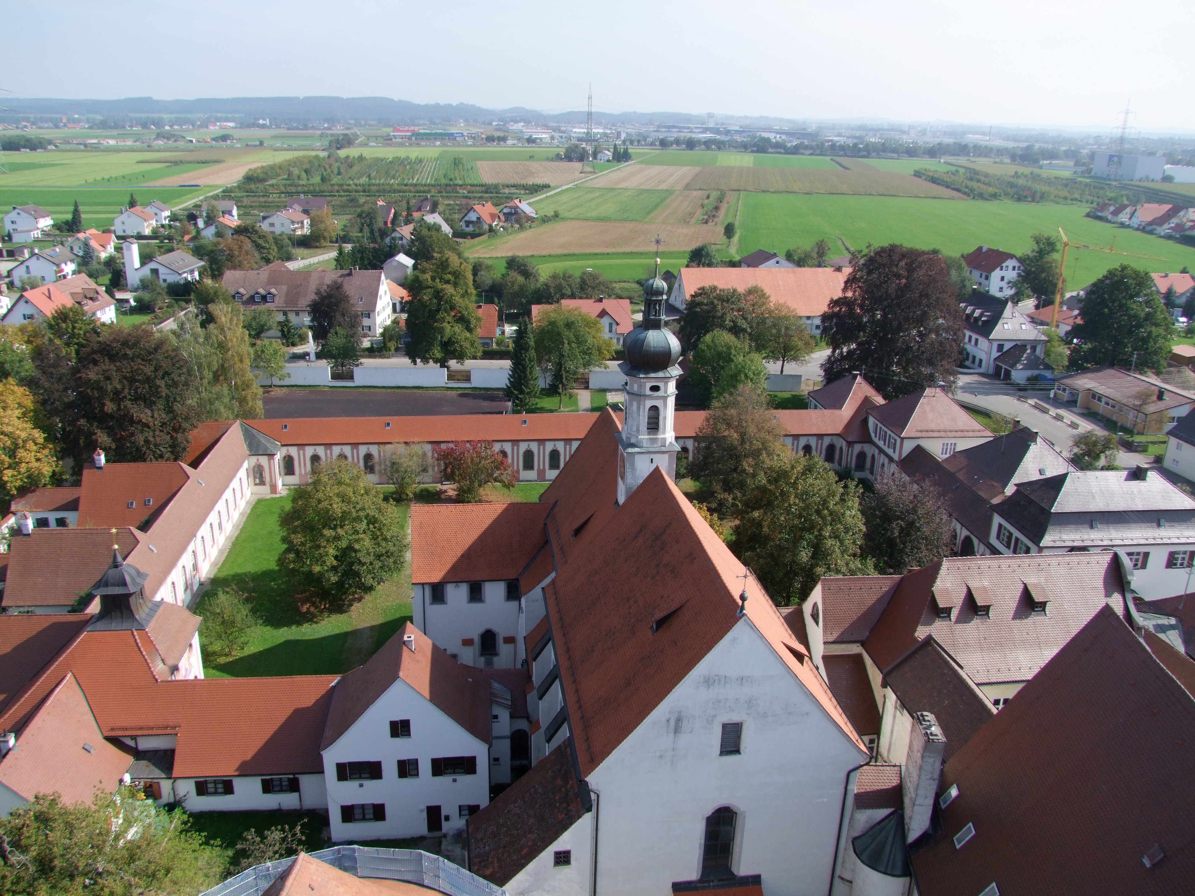 St. Maria, ehemalige Klosterkirche im oberschwäbischen Buxheim. Stadt in Ferne Memmingen.